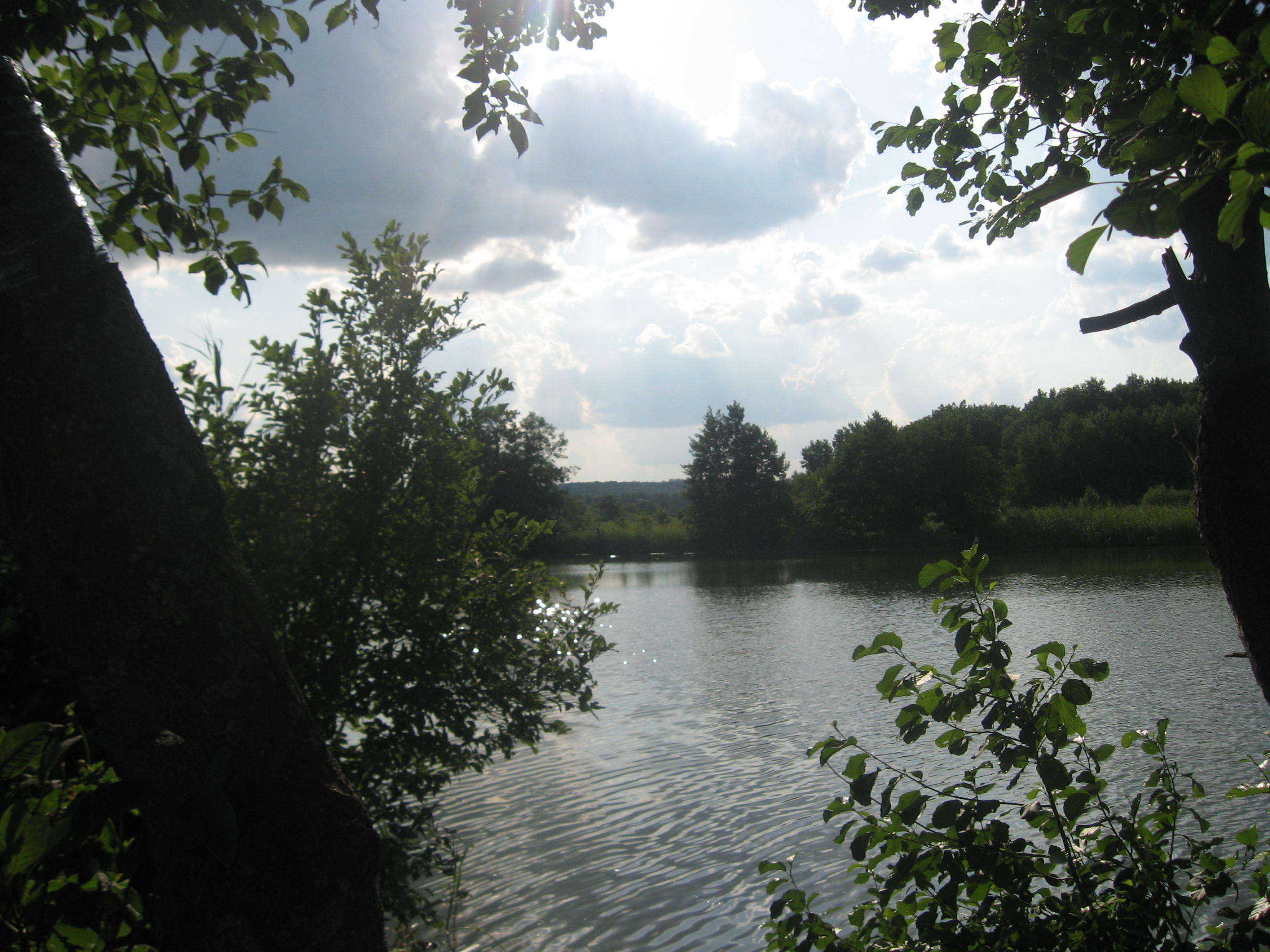 Видна река.